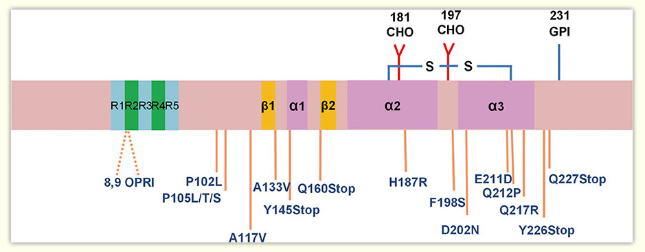 GSS genetikai ábra